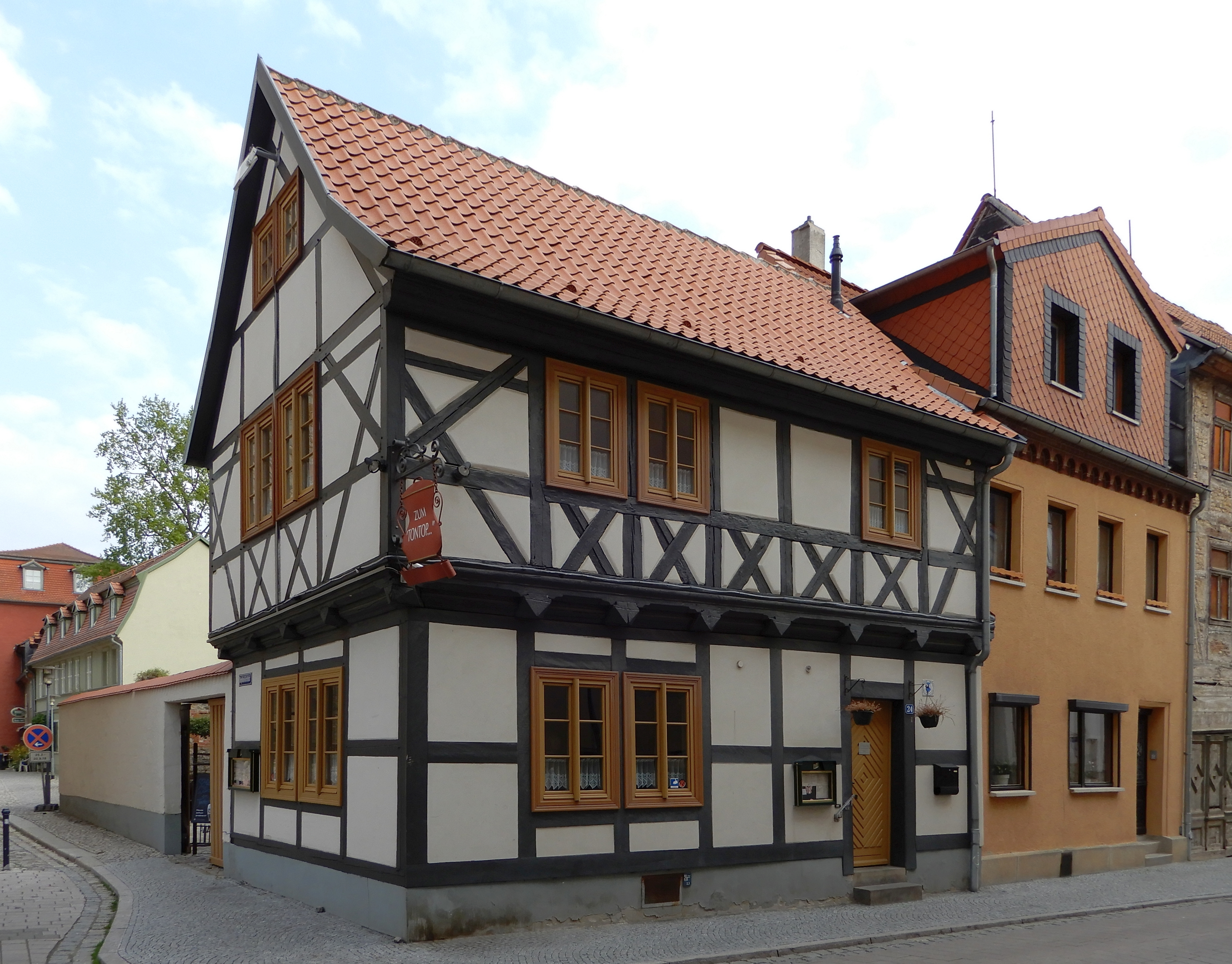 Gebäude Hinter dem Turm 24 in Aschersleben